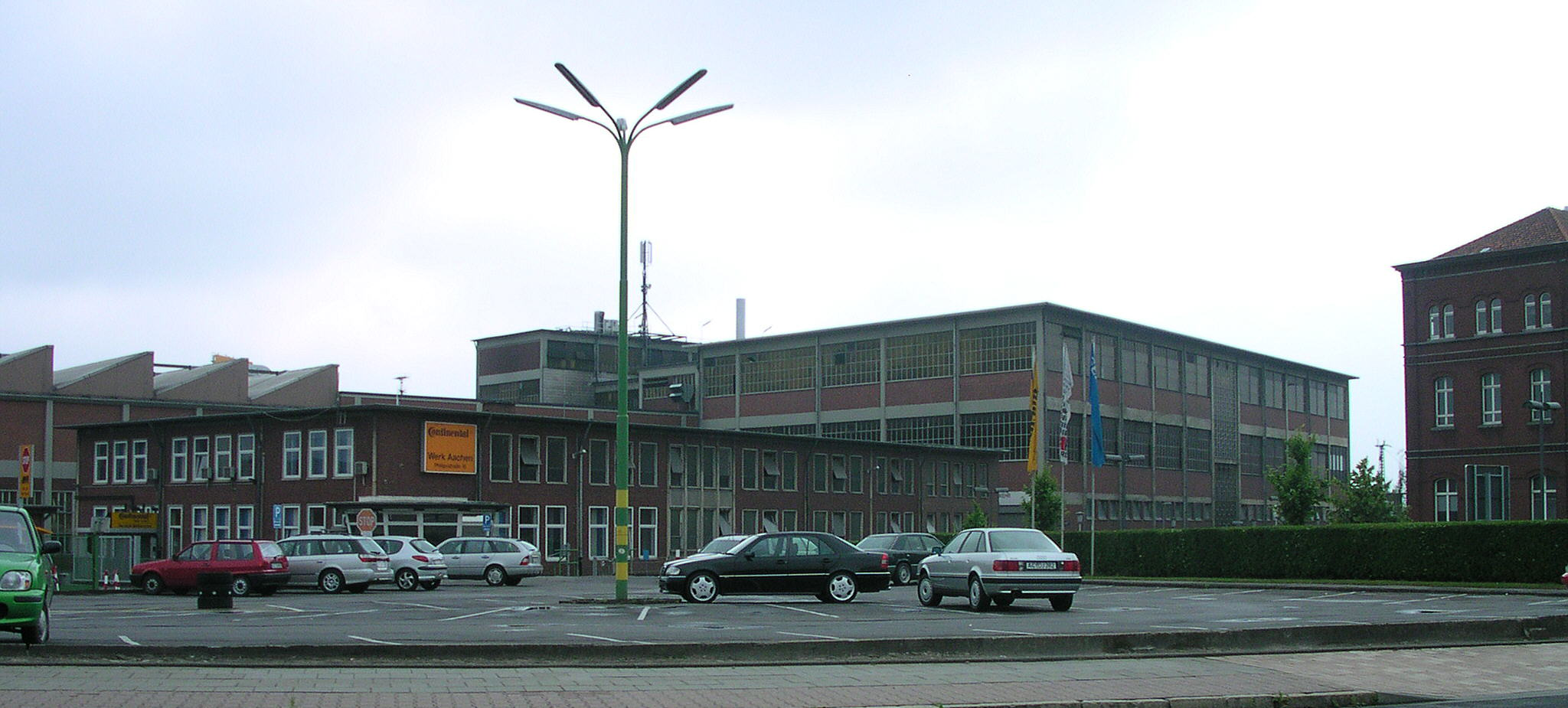 Aachen, Uniroyal-Gebäude Am rechten Bildrand sieht man einen Teil des ehemaligen Verwaltungsgebäudes des Stahlwerks "Rothe Erde", das auf einem anderen Bild zu sehen ist, nun aber auch zu Continental gehört.